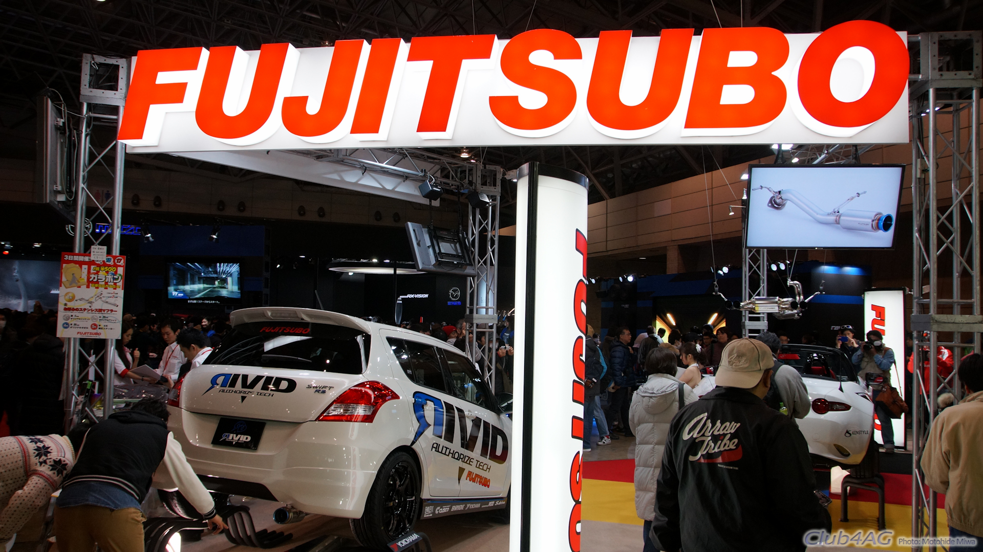 Tokyo Auto Salon 2016 Cars